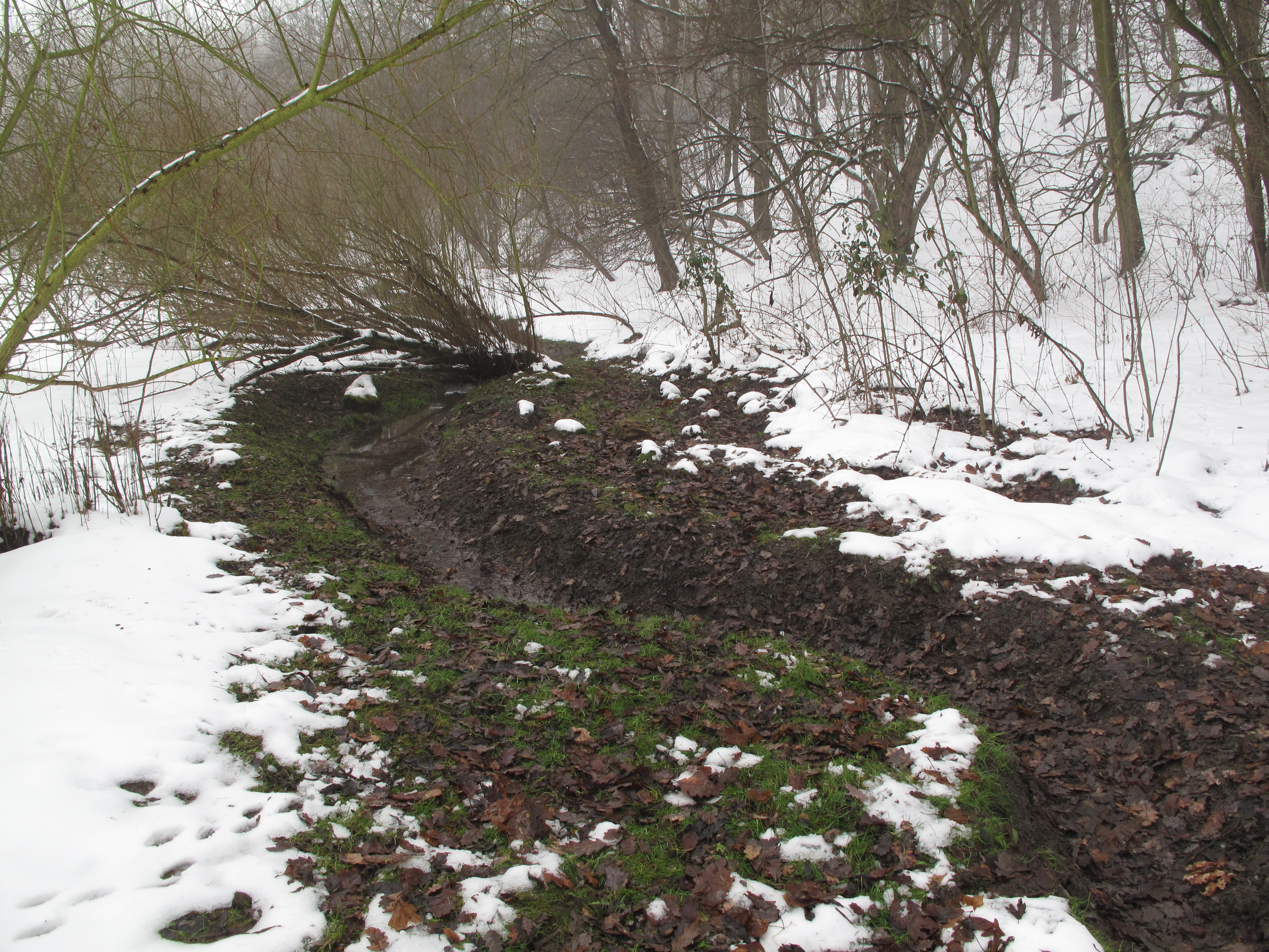 Přírodní památka Čimické údolí